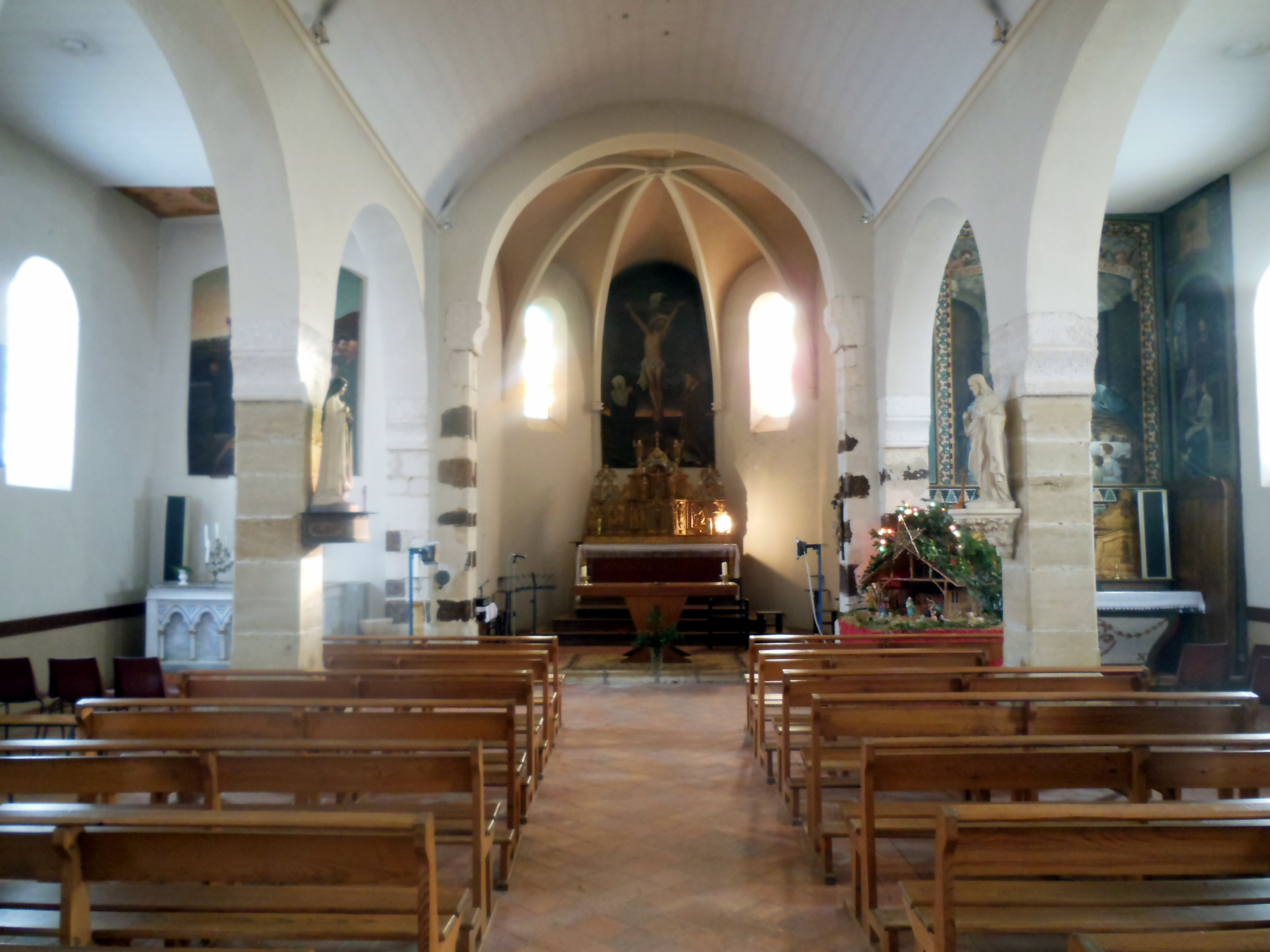 Église Saint-Pierre de Banos (Landes, FRance), vue intérieure